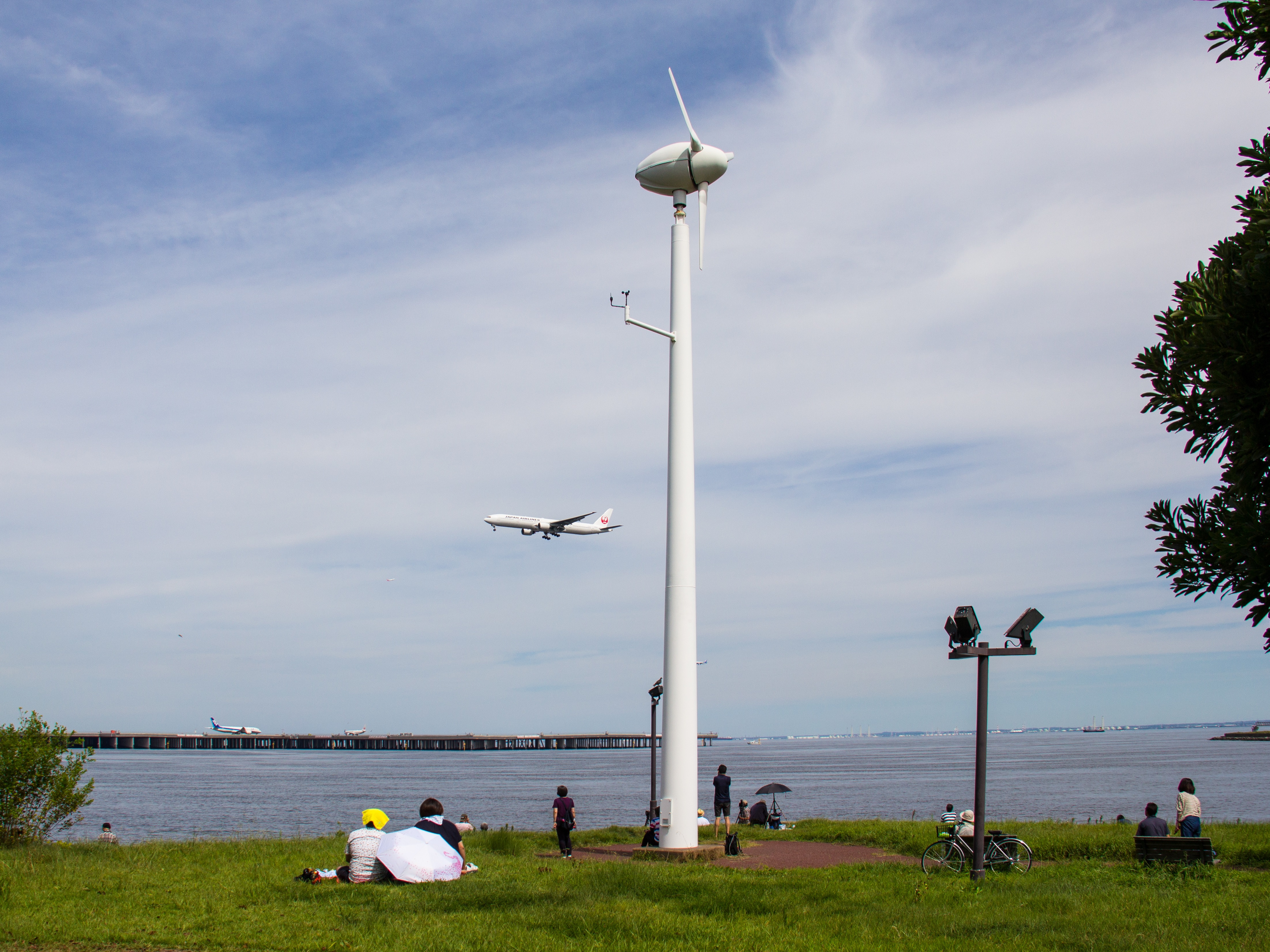 浮島町公園 公園中央部